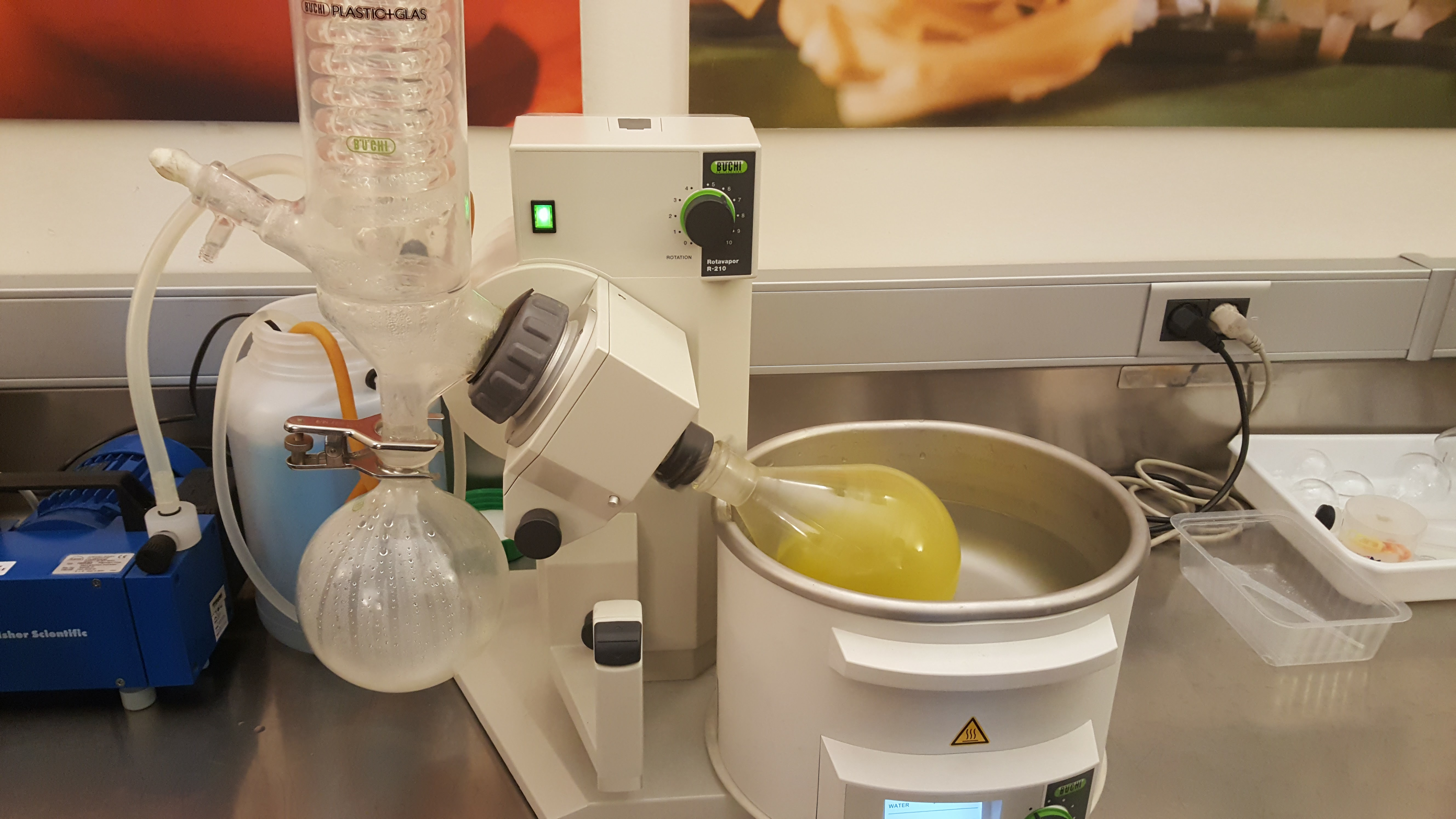 rotaval destil·lació d'oli d'oliva verge